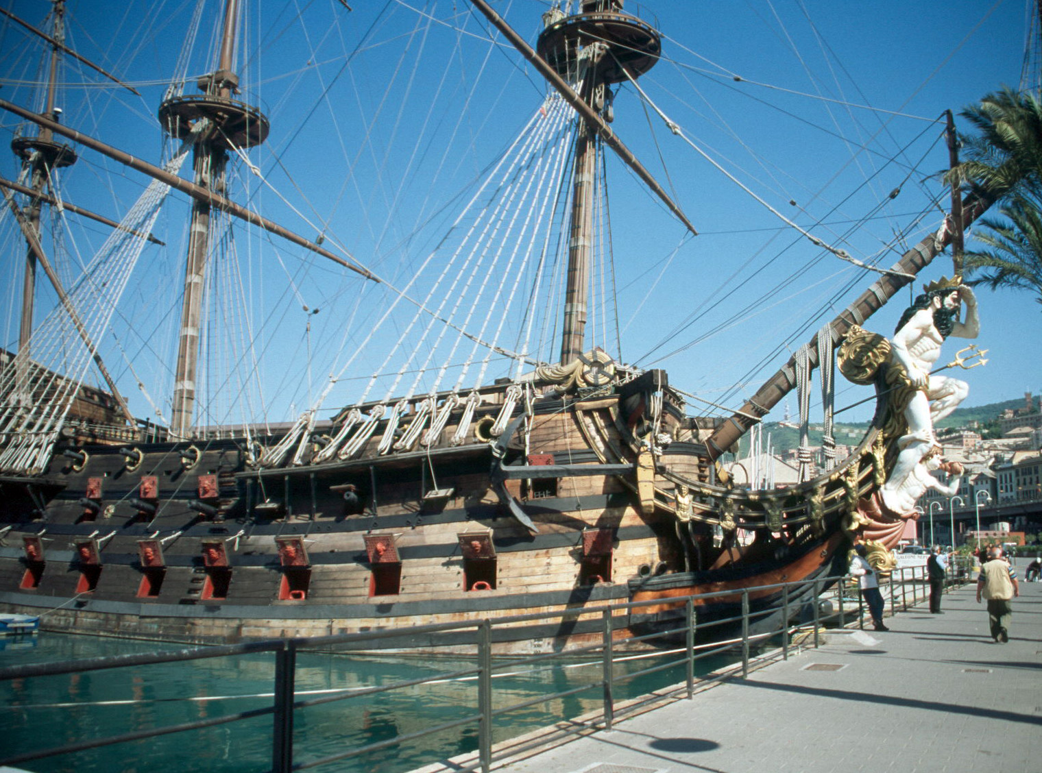 Genua 2004